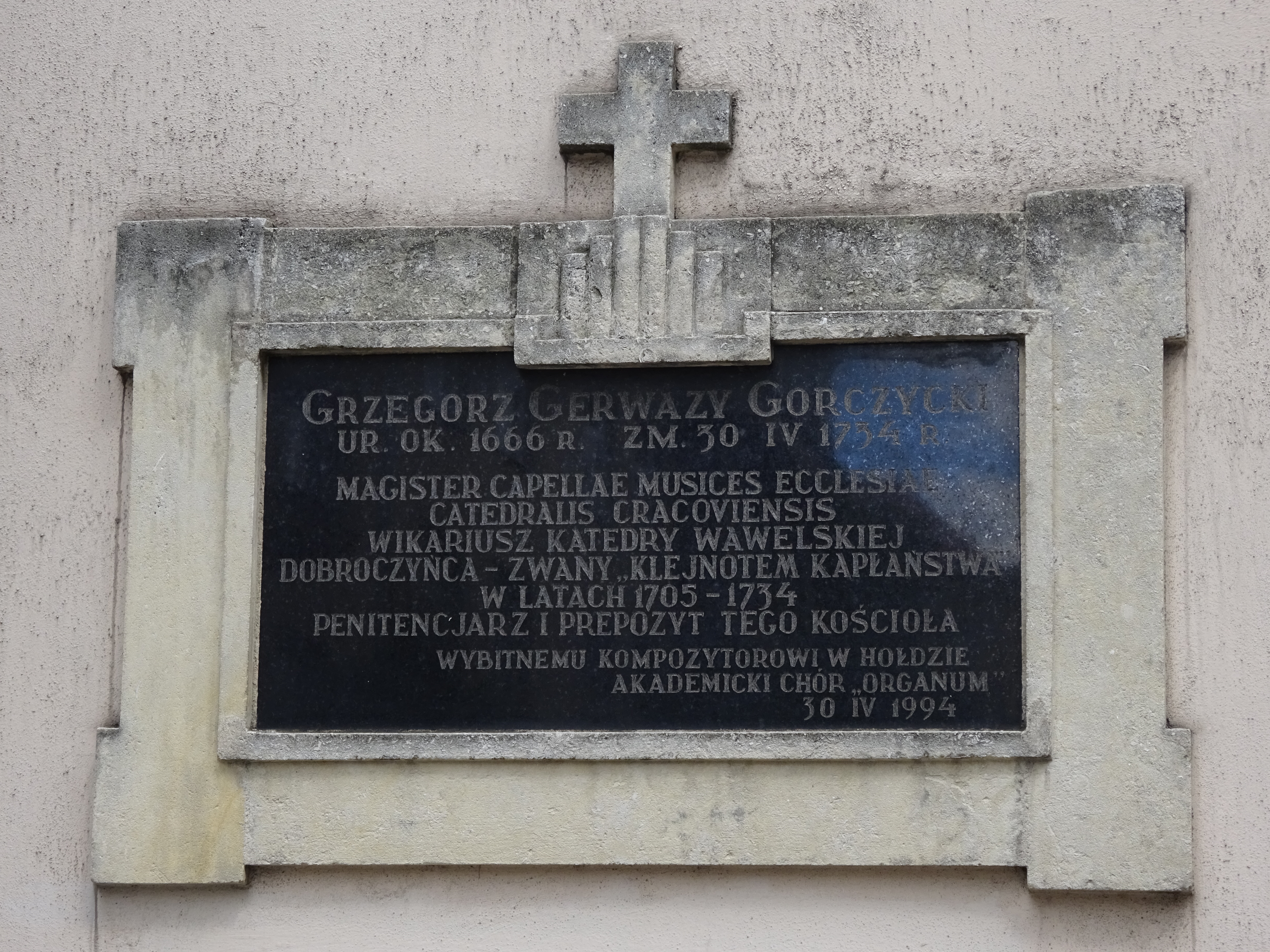 Tablica upamiętniająca Grzegorza Gerwazego Gorczyckiego - księdza i kompozytora wmurowana w zachodnią ścianę kościoła Miłosierdzia Bożego na Nowym Świecie, gdzie był penitencjarzem i prepozytem. Odsłonięta 30 kwietnia 1994 roku - w 260 rocznicę śmierci. Kraków, 2017.